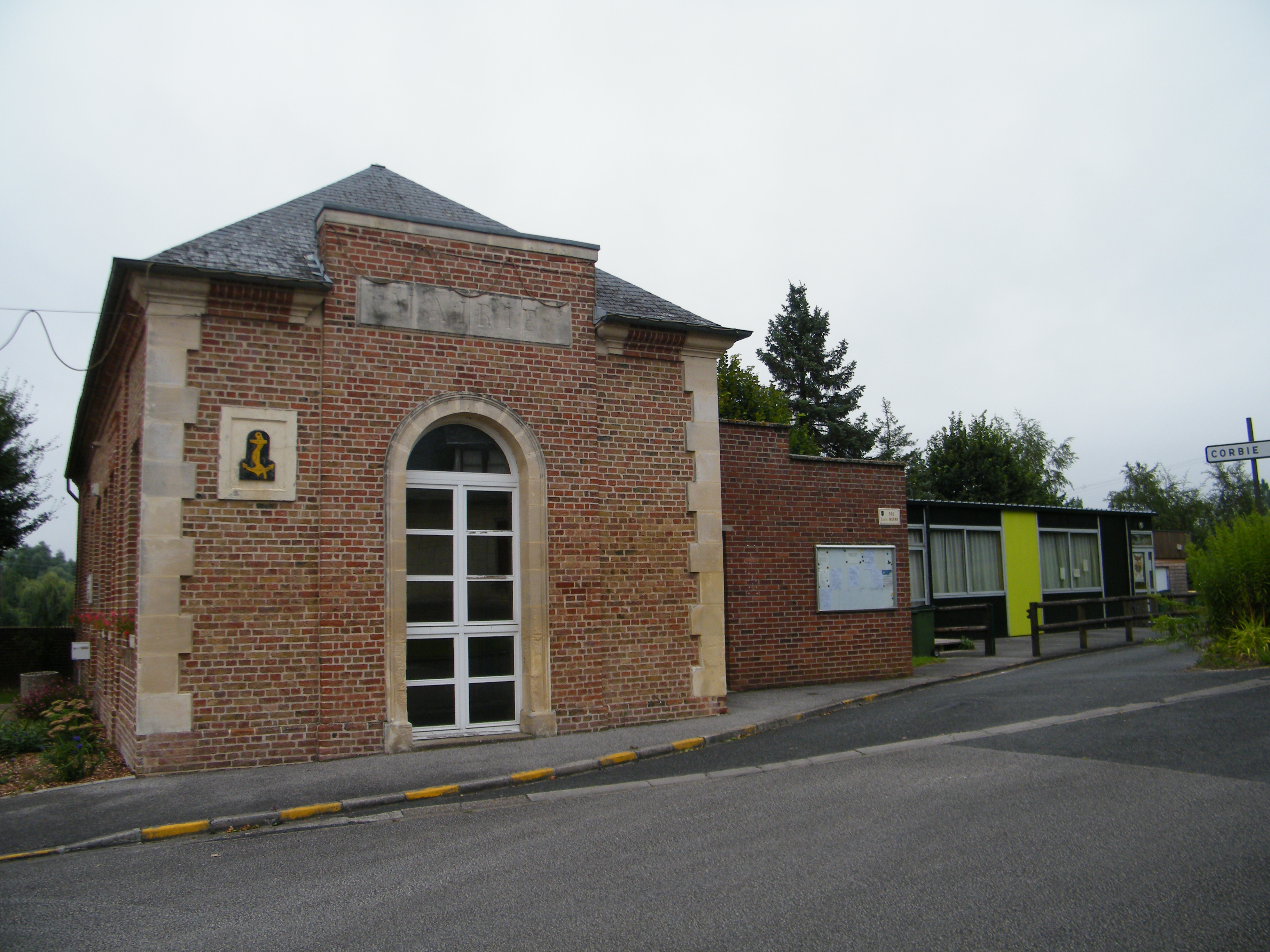 Bâtiments communaux.